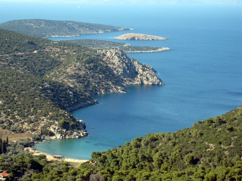 Poros